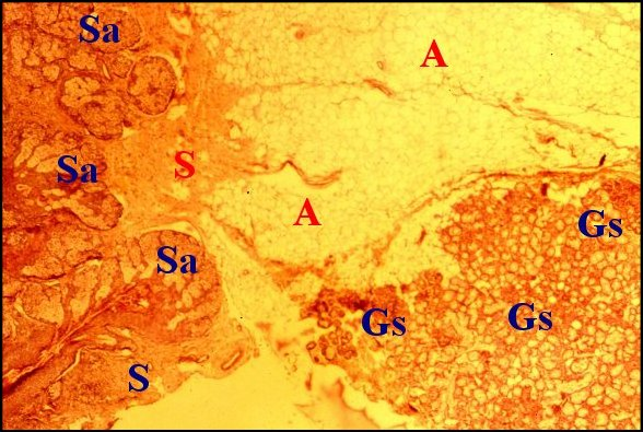 Vue d'ensemble d'une hétérotopie dans l'oreille moyenne